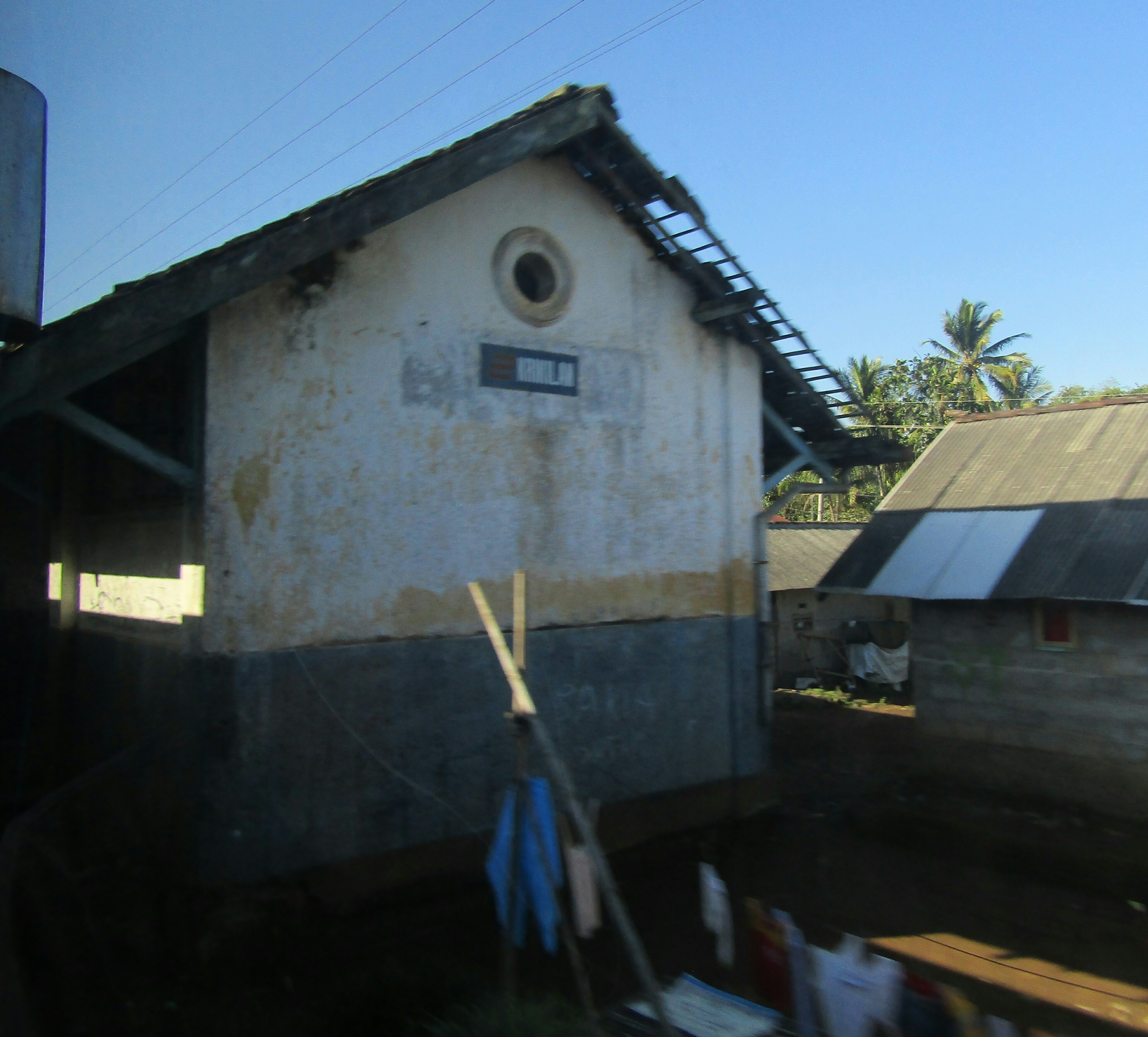 Bangunan utama Halte Krikilan, 2019